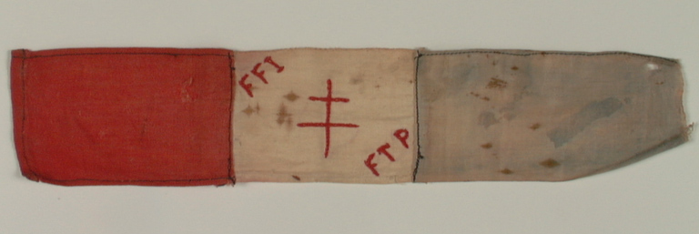 Brassard fait de trois pièces de tissu différent. Siglé FFI / FTP, il porte au centre une croix de Lorraine.